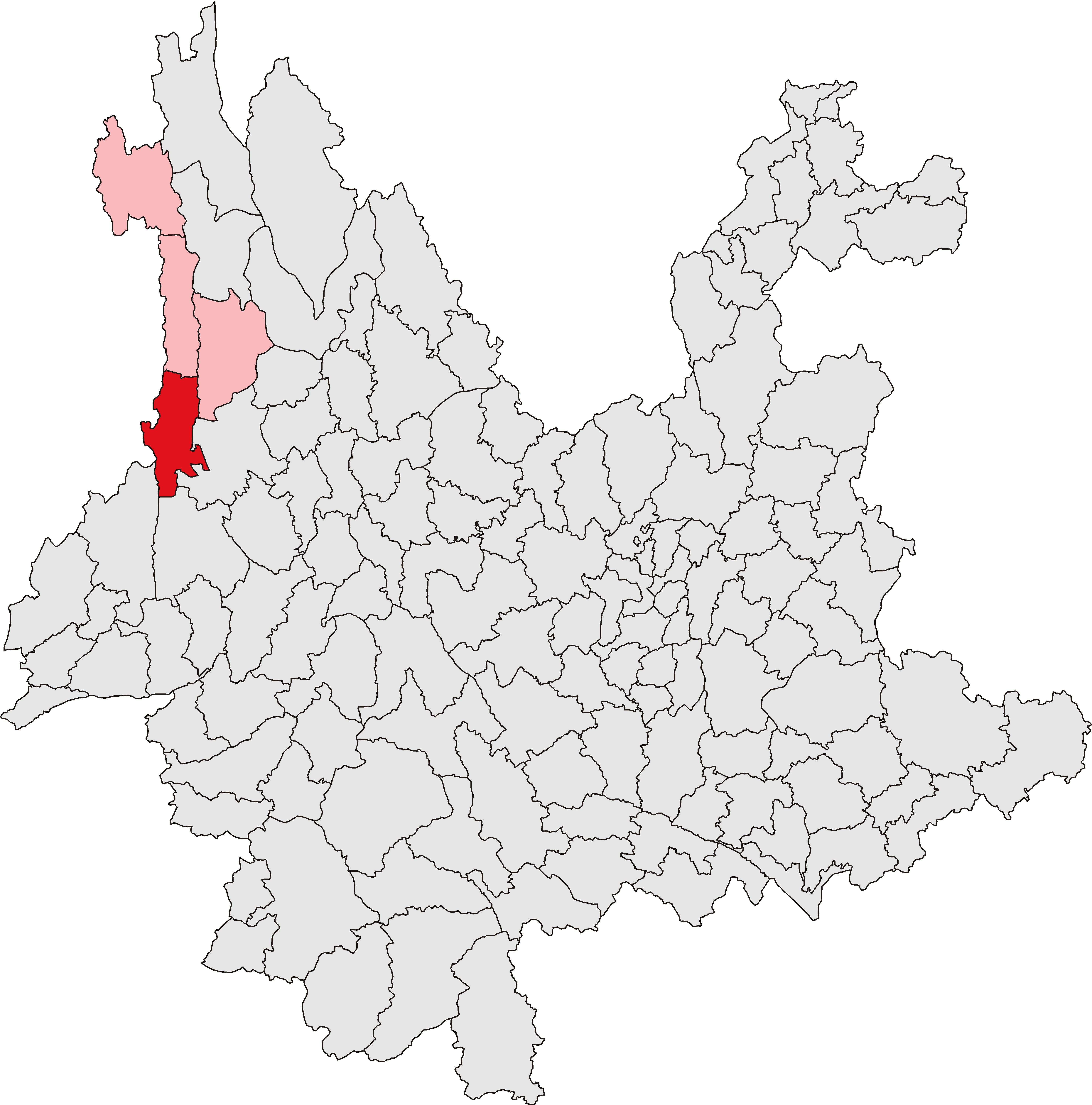 中文（中国大陆）: 泸水市位置图